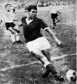 Mladen Kranjc - Didi (1945-1988). Na tekmi NK Maribor- FK Bor.